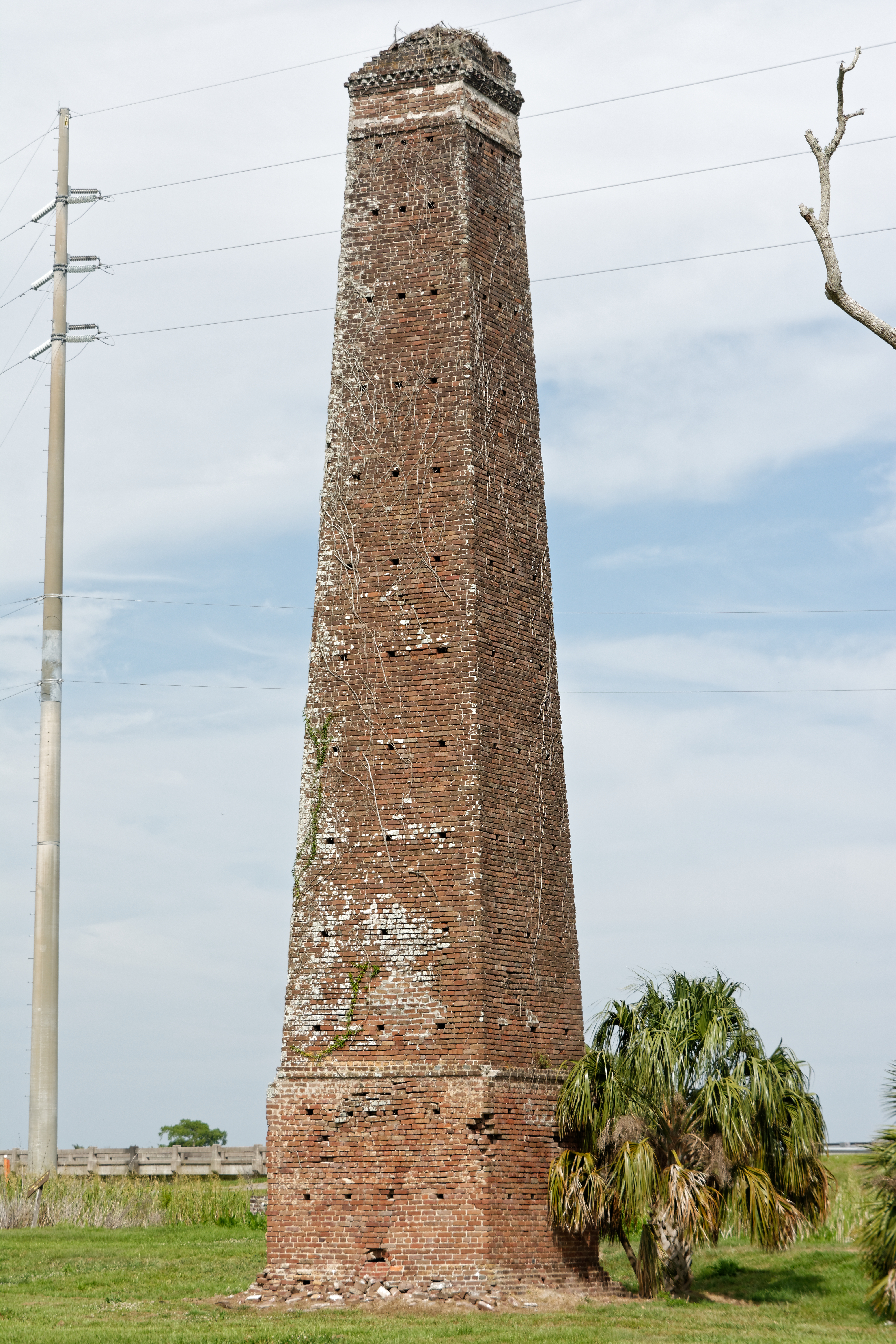 Butler Island Plantation, Darien, Georgia, U.S.